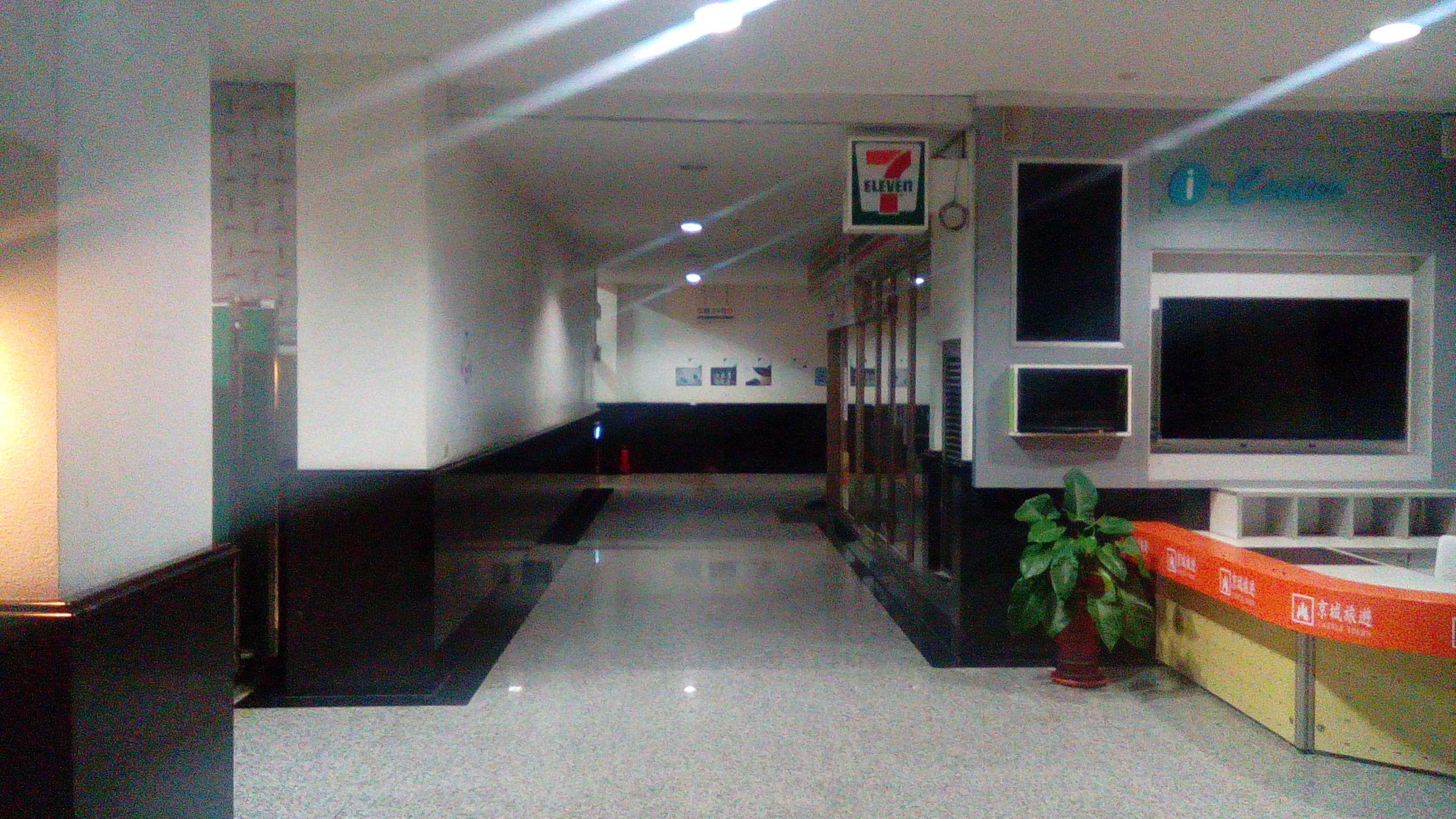 同上